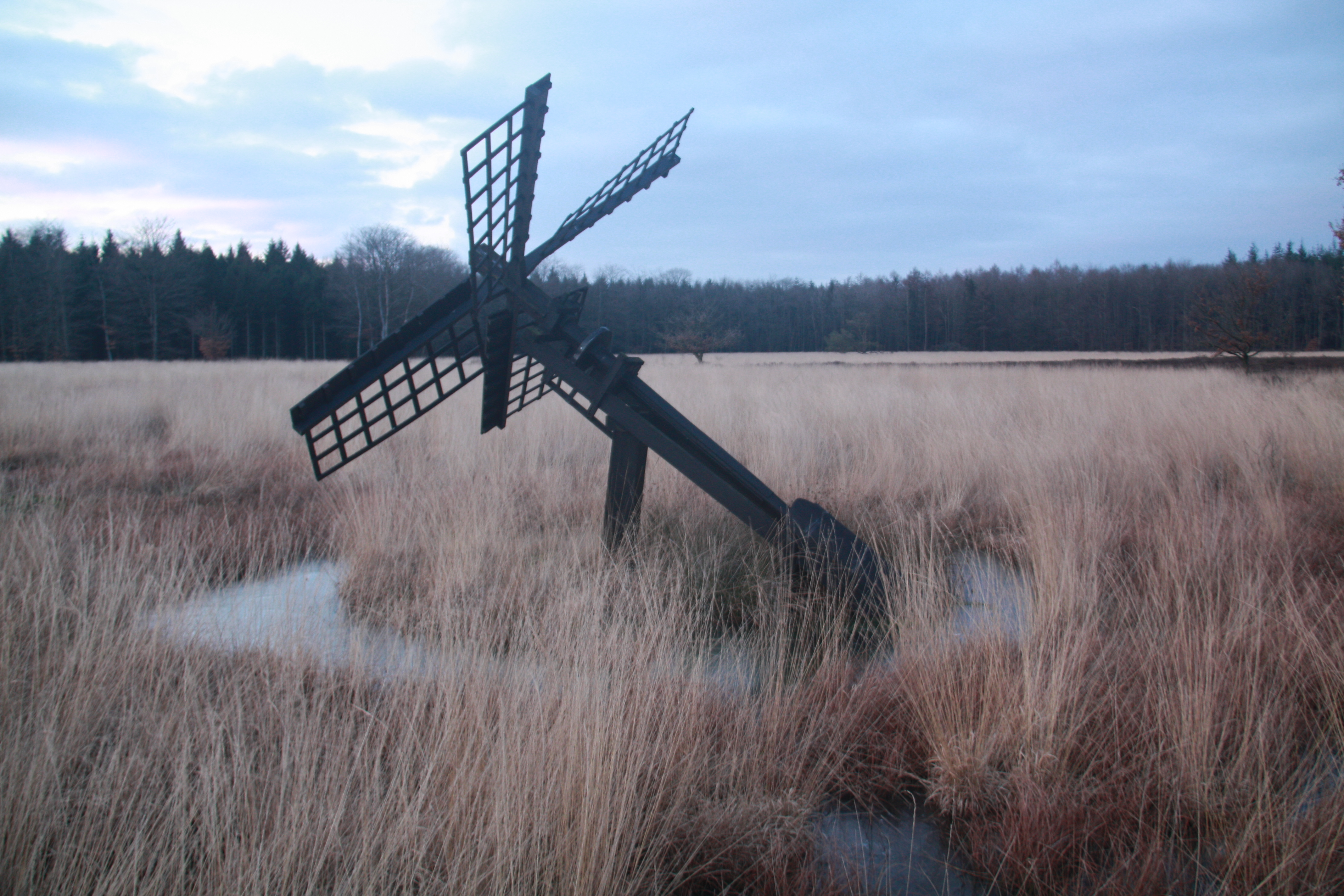 Tjasker Grolloo